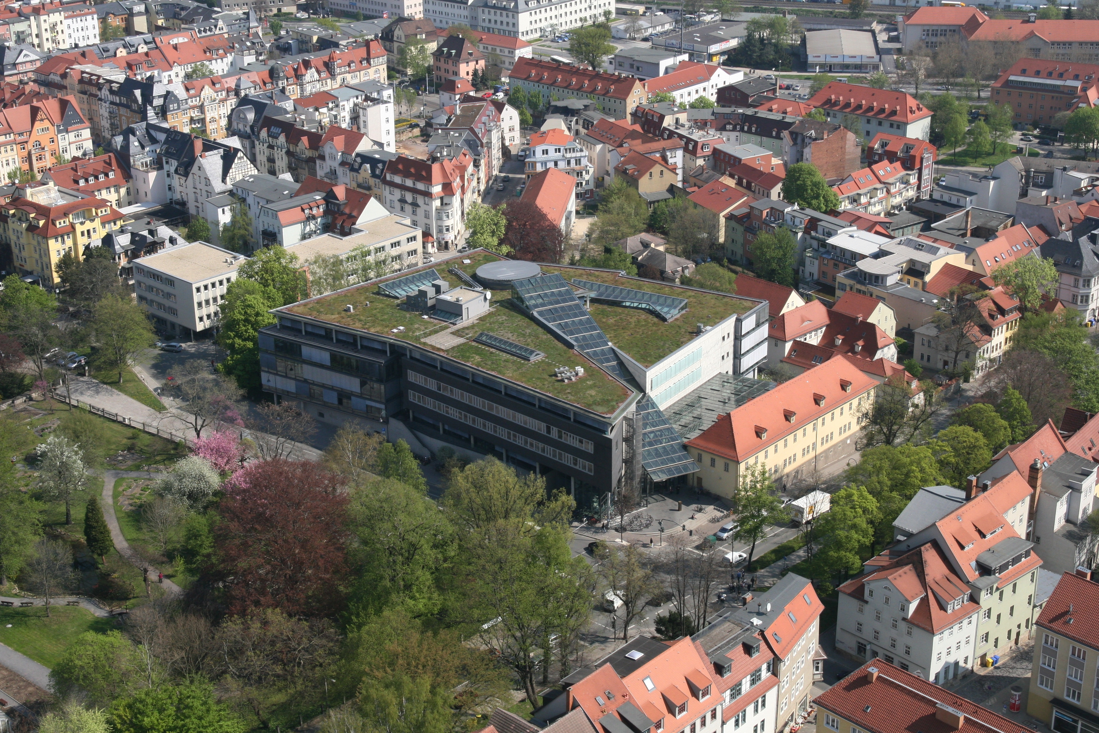 ThULB (Thüringer Universitäts- und Landesbibliothek) im April 2011